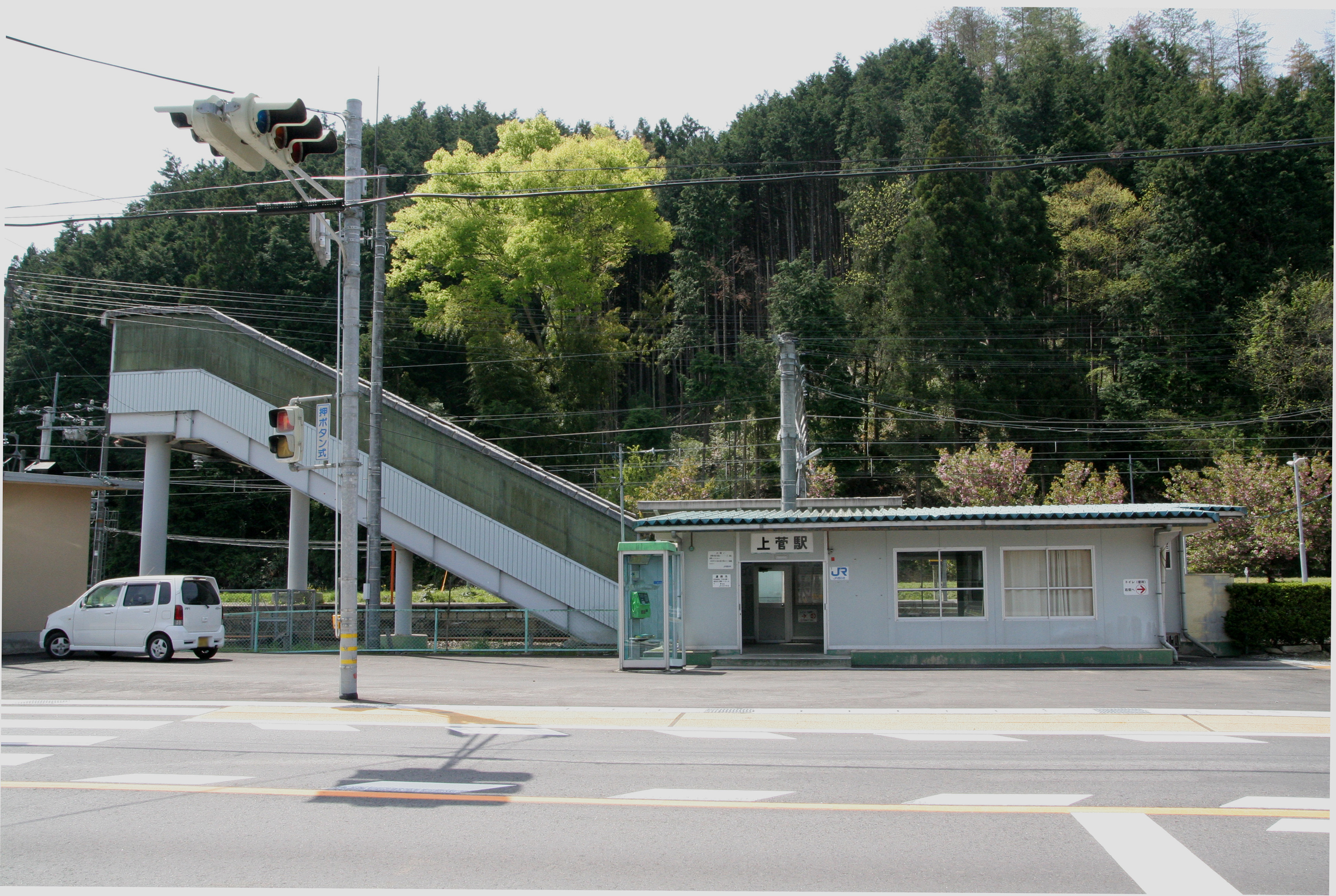 上菅駅の駅舎